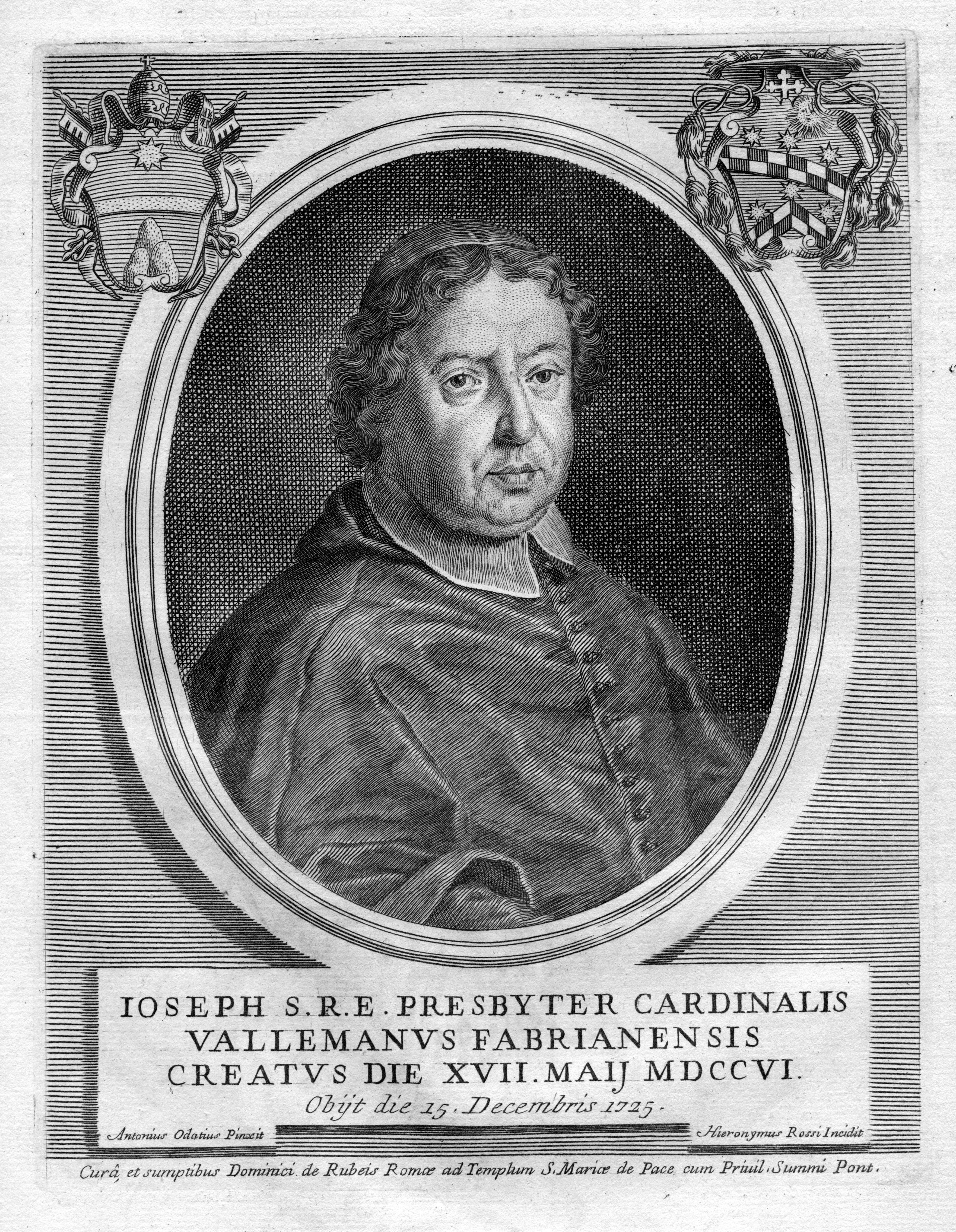 Portrait de Giuseppe Vallemani (1648-1725)